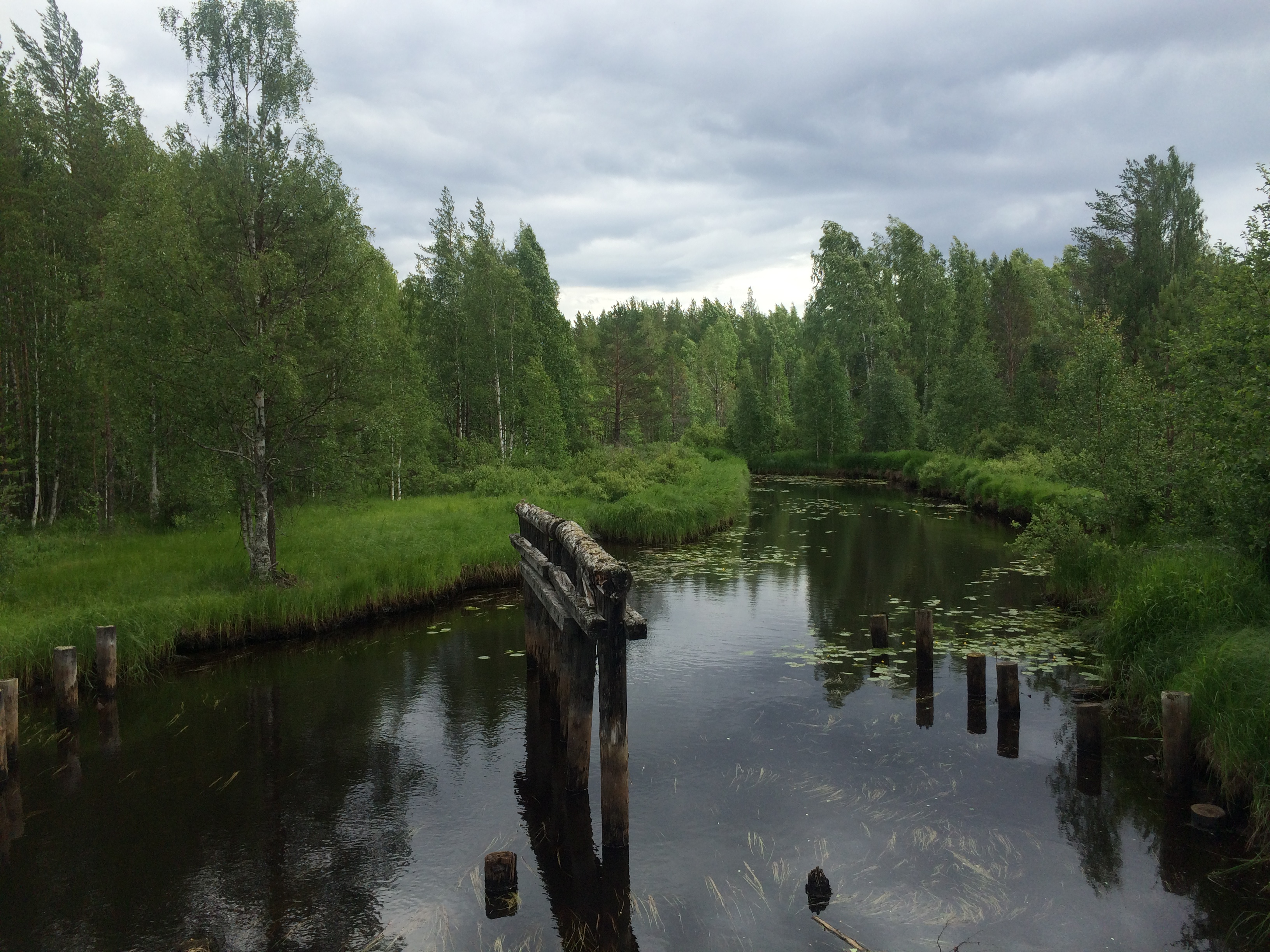 Шоба (река)